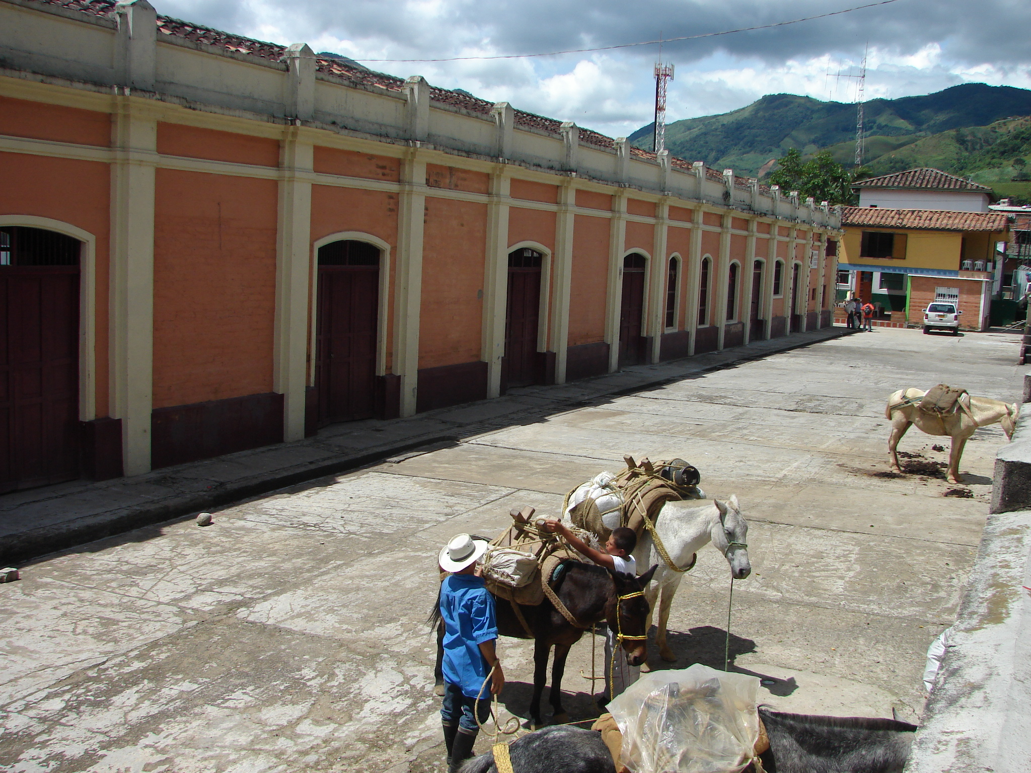 Antigua Estación, Municipio de Cisneros, Antioquia, Colombia.CISNEROS - ANTIOQUIA